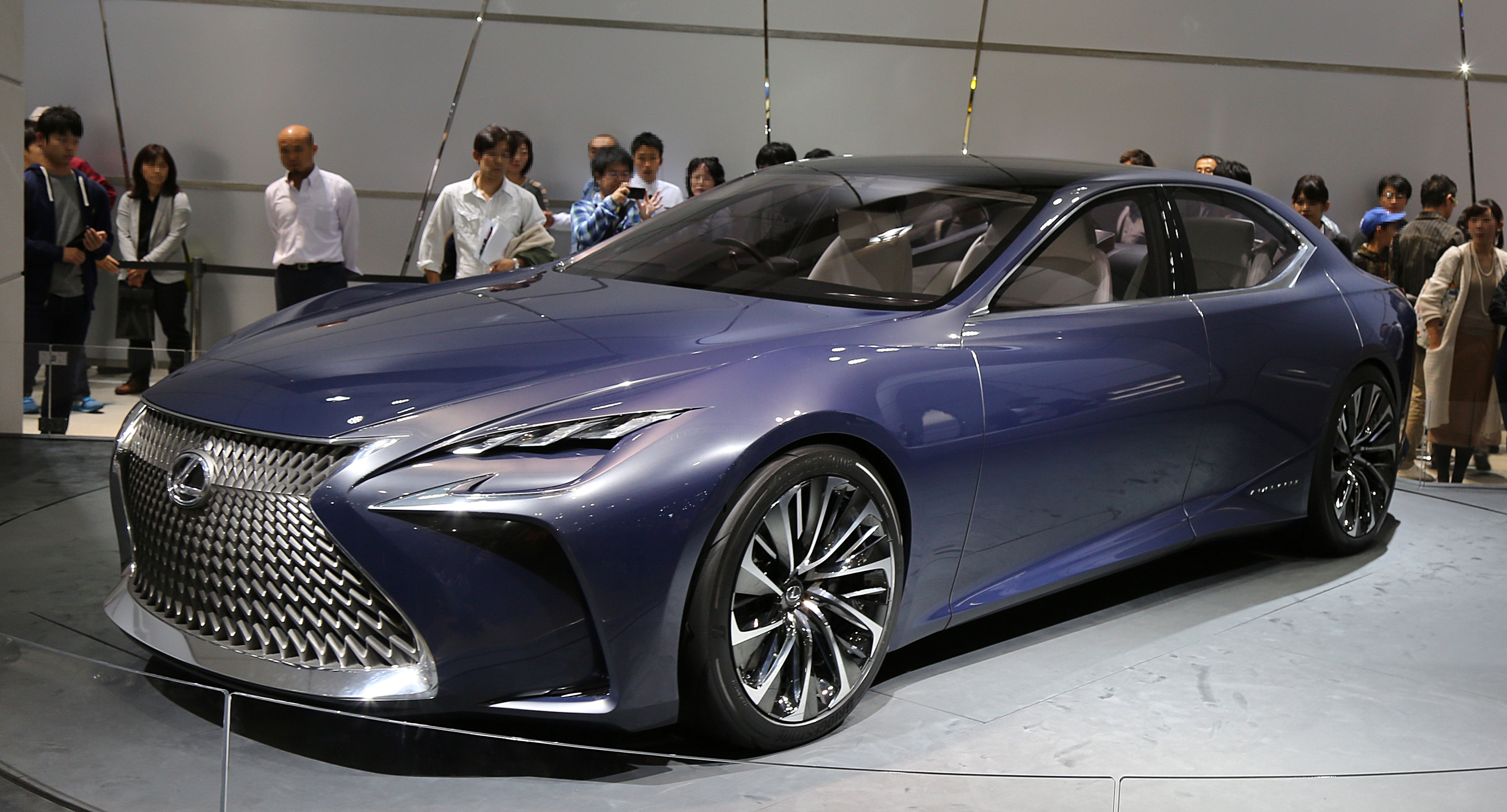 Lexus LF-FC